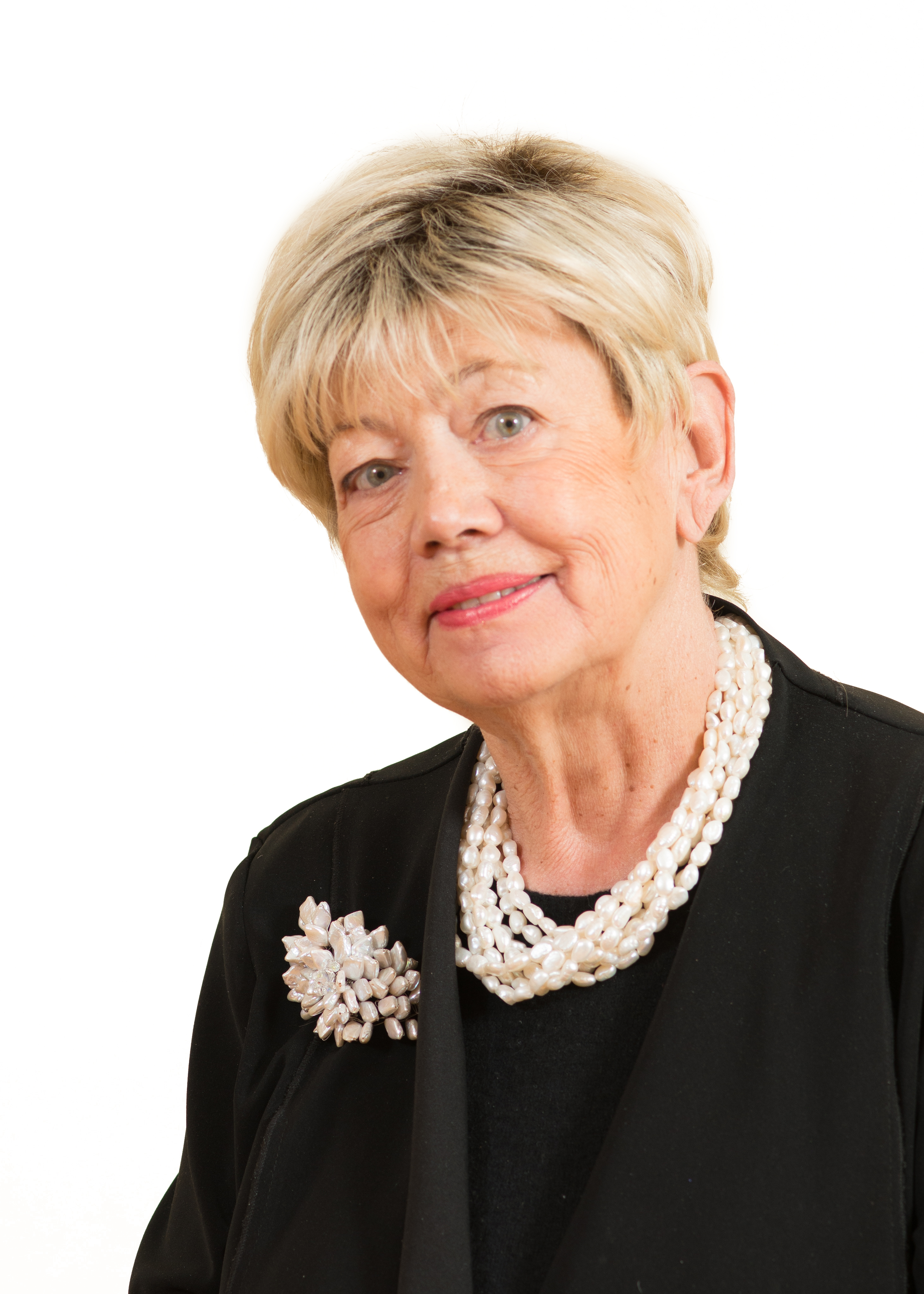 Ivi Eenmaa